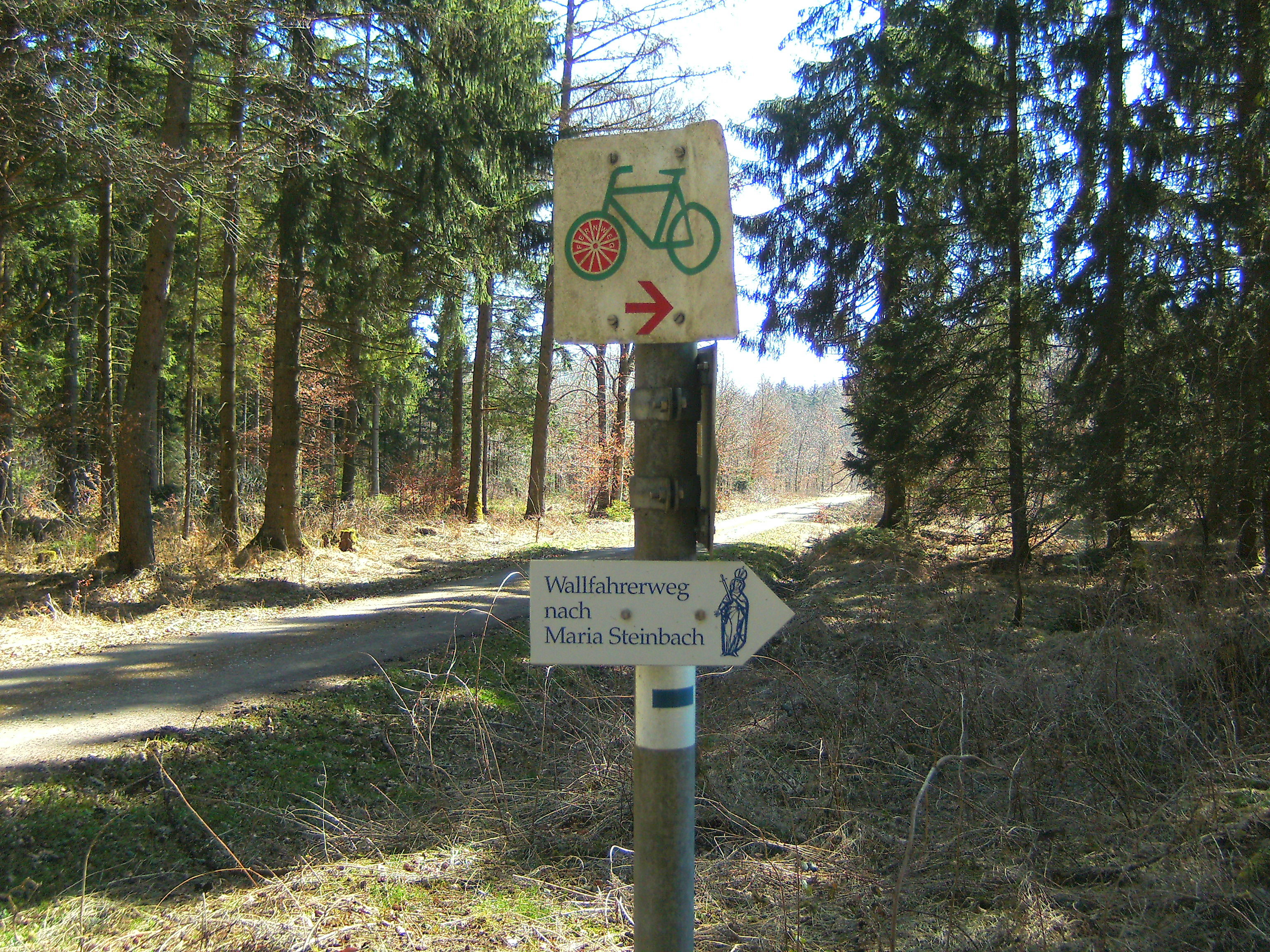 Wallfahrtswegweiser nach Maria Steinbach